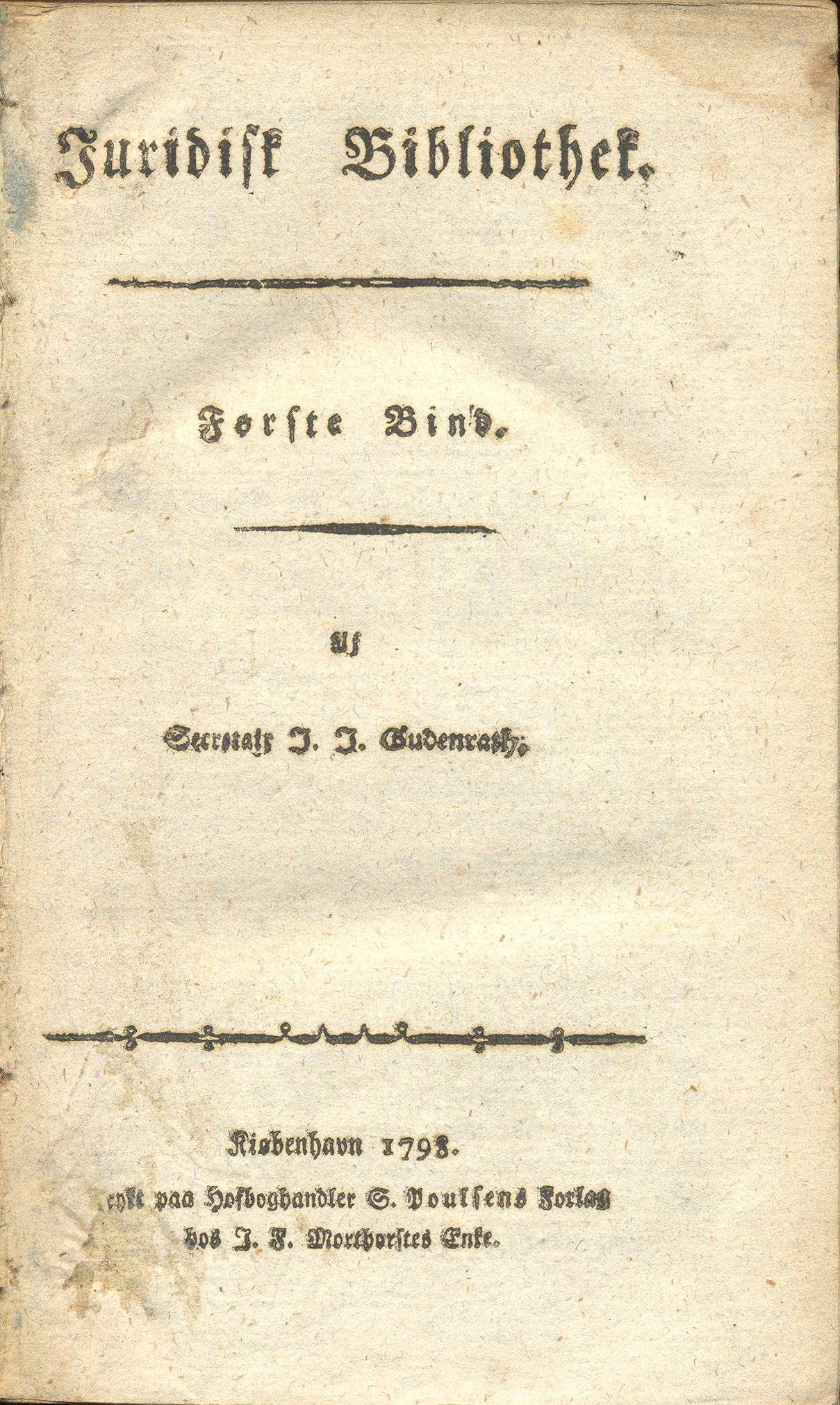 Titelbladet til første bind af Juridisk Bibliothek fra 1798, udgivet og forfattet af Jacob Just Gudenrath (1758-1825).